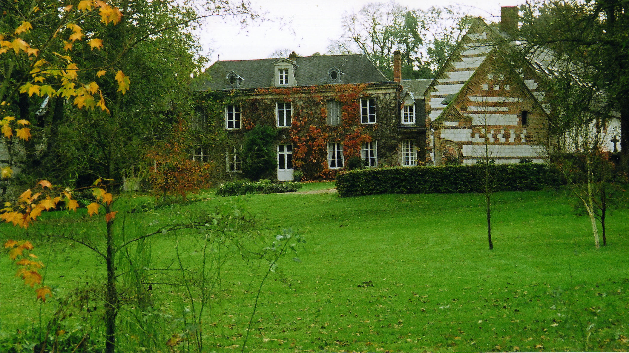 Maisnières (Somme, France) Façade arrière du château d'Harcelaines, vue de la route (mi-XVIe, mi-XIXe).